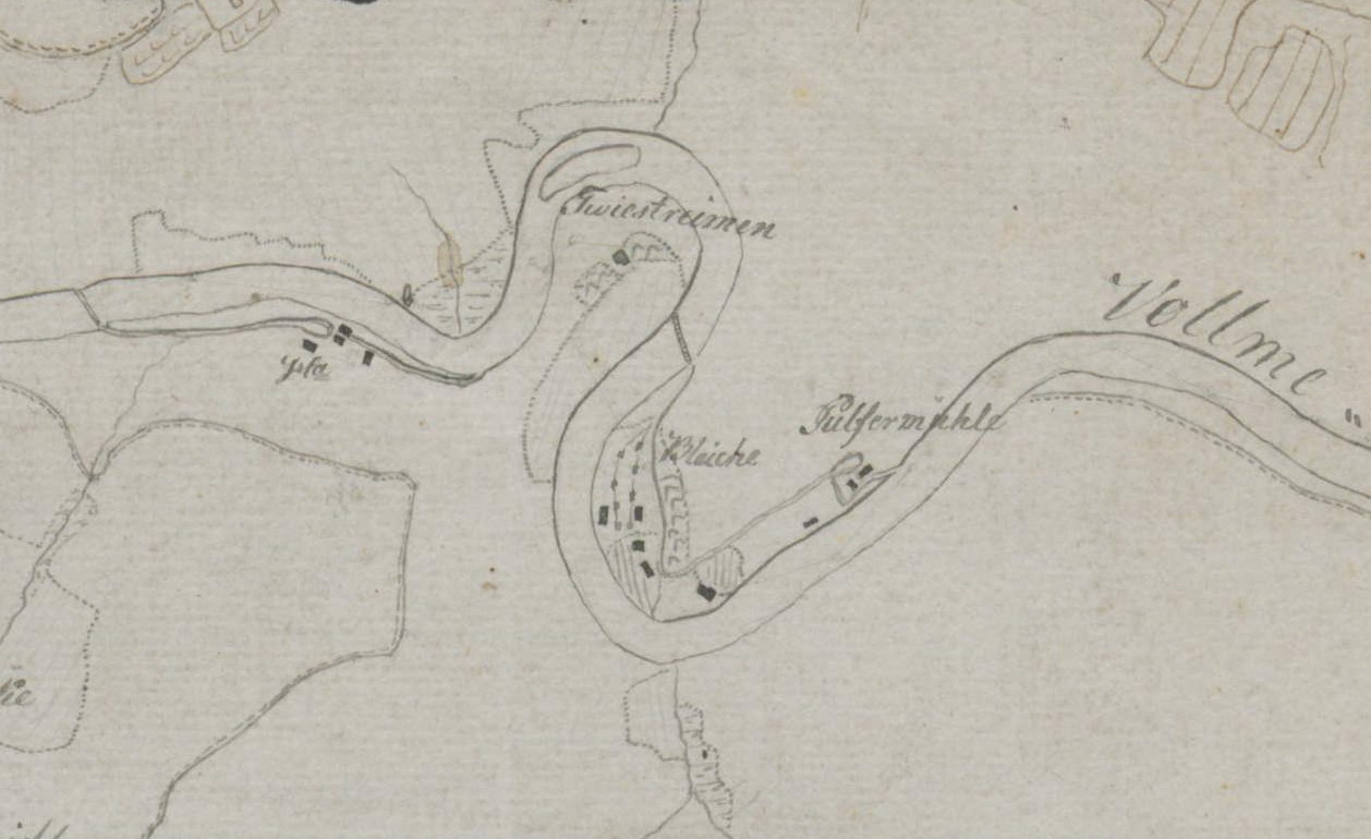 Handrisse (Mensalblätter) zur Karte der Grafschaft Mark von Eversmann um 1795 Ausschnitt Twieströmen